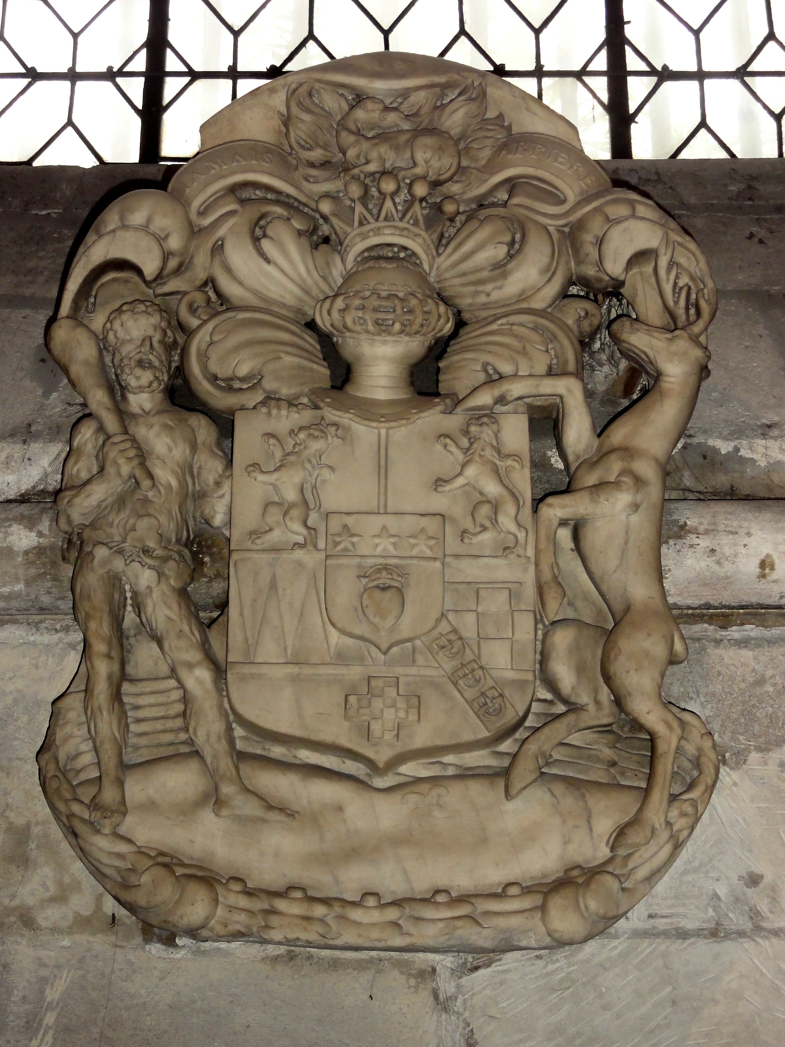 Chapelle Ste-Thérèse, monument pour Jacques Douglas, blason.